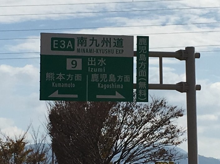 南九州西回り自動車道の出水インターチェンジの入口標識。熊本方面は本来表示されていないが、標識の被覆をはがした直後であったため、熊本方面の表示が出ている。